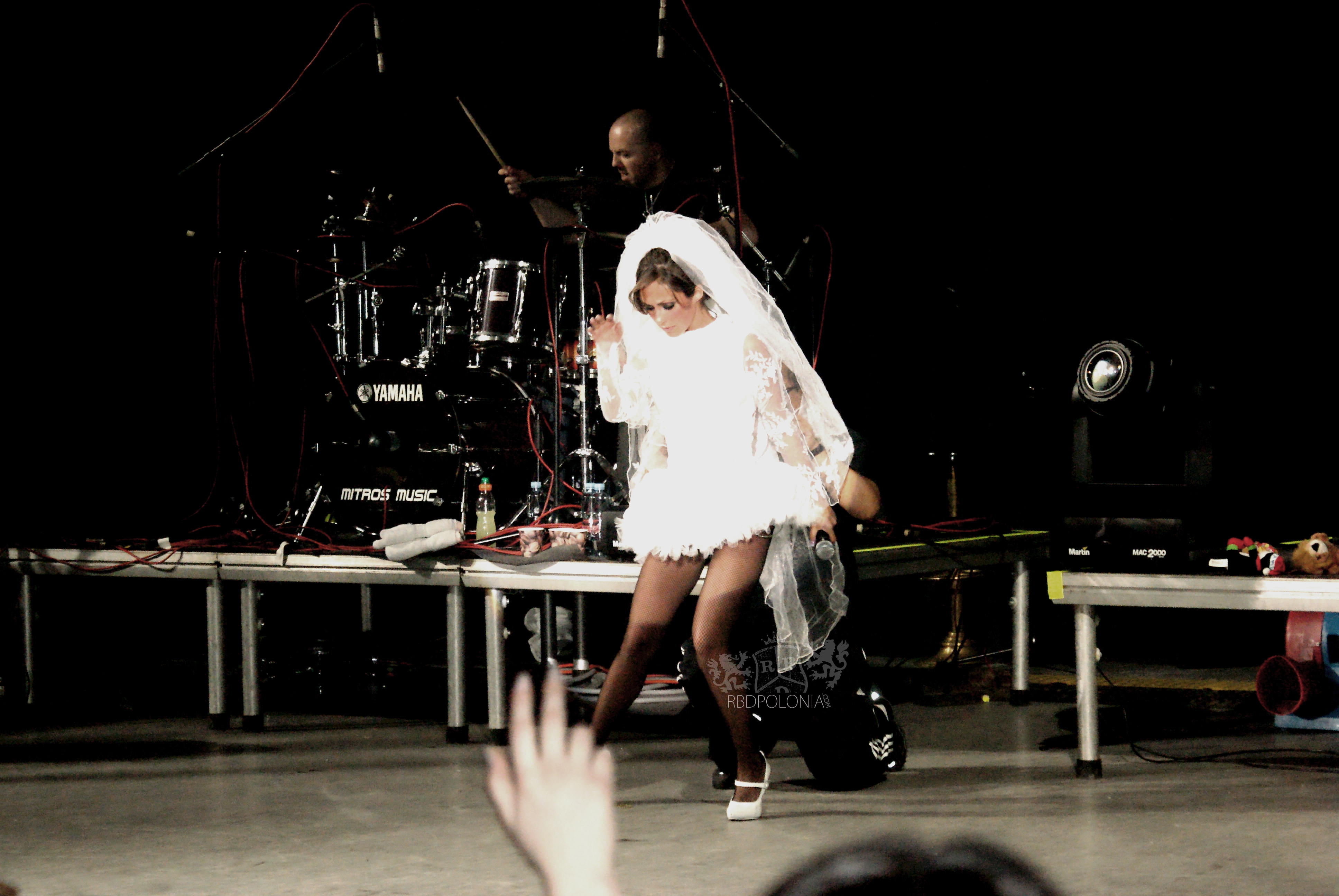 Anahí durante su gira Mi Delirio World Tour en Serbia, 10 de marzo de 2010.